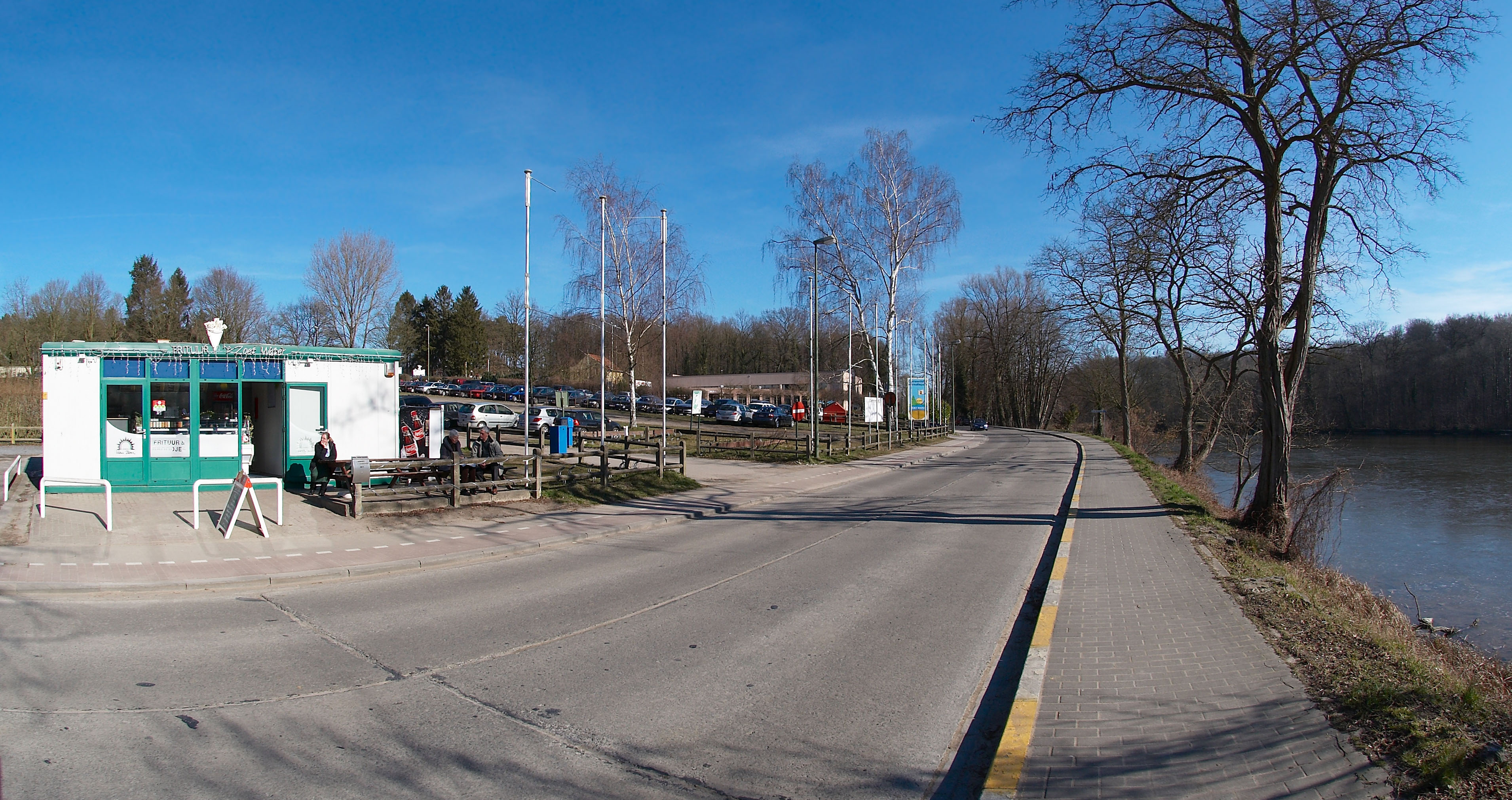 Maurits Noëstraat, Zoet Water, Oud-Heverlee, België in de buurt van een frituur en restaurant Zoete Bron. Kijkrichting oost.